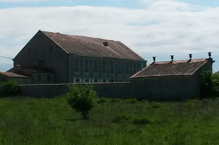 Château d'Allerit-Valllans-79-France